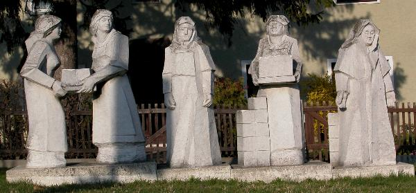 Denkmal in der Wundtgasse in Wien-Meidling